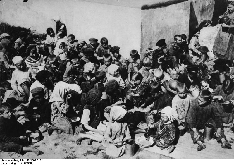 Deutsche Verwaltung in Litauen Speisung von Bettlerkindern in der Wilnaer Volksküche